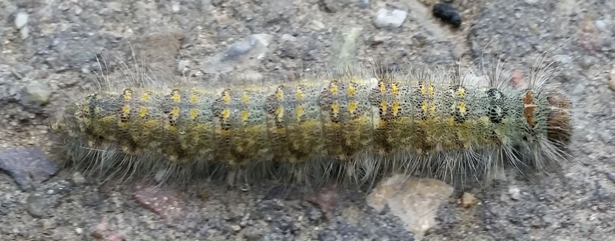 Raupe der Kleinen Pappelglucke (Poecilocampa populi) nahe Walldorf/Baden